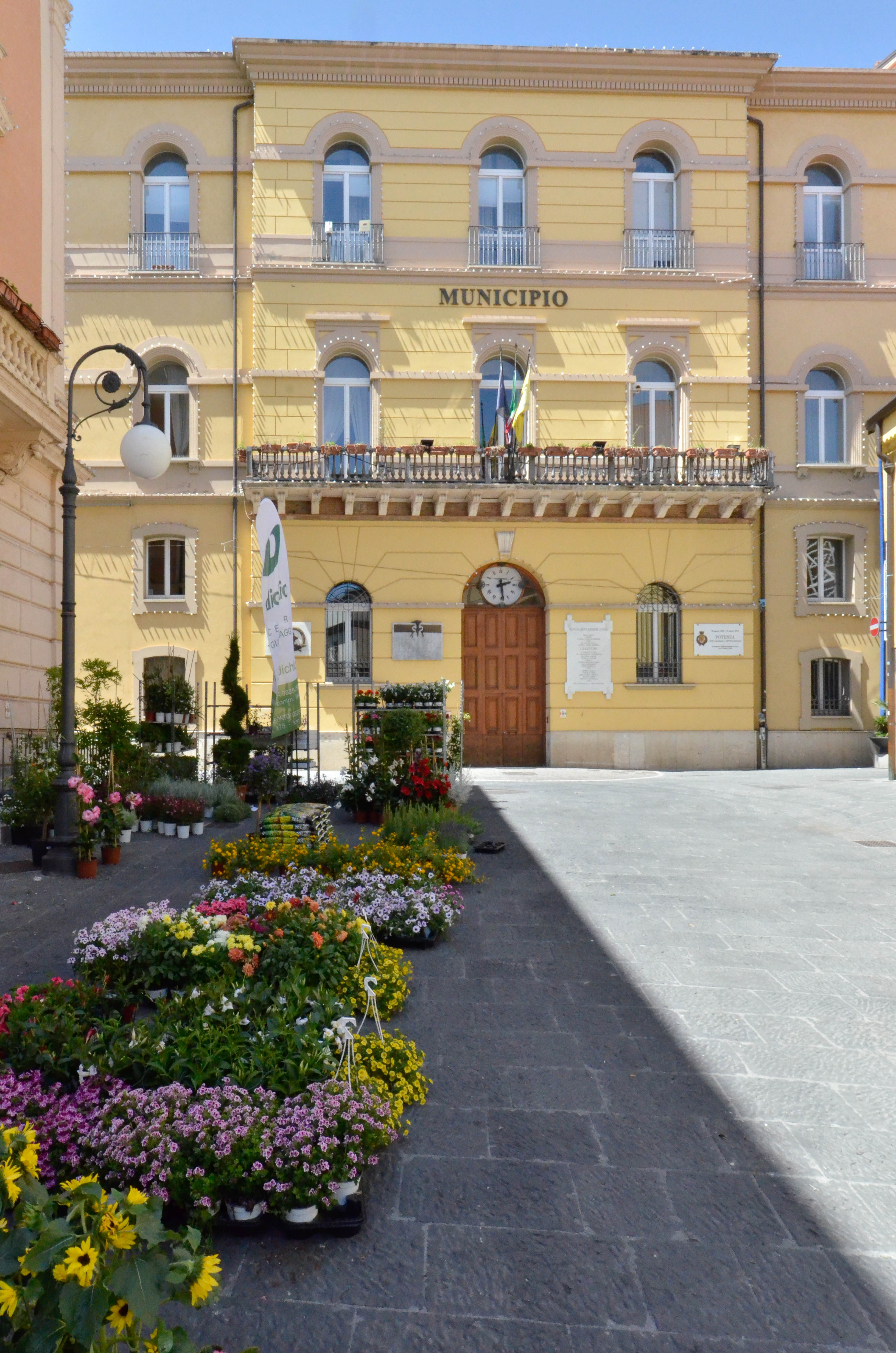 Palazzo di Città This is a photo of a monument which is part of cultural heritage of Italy.